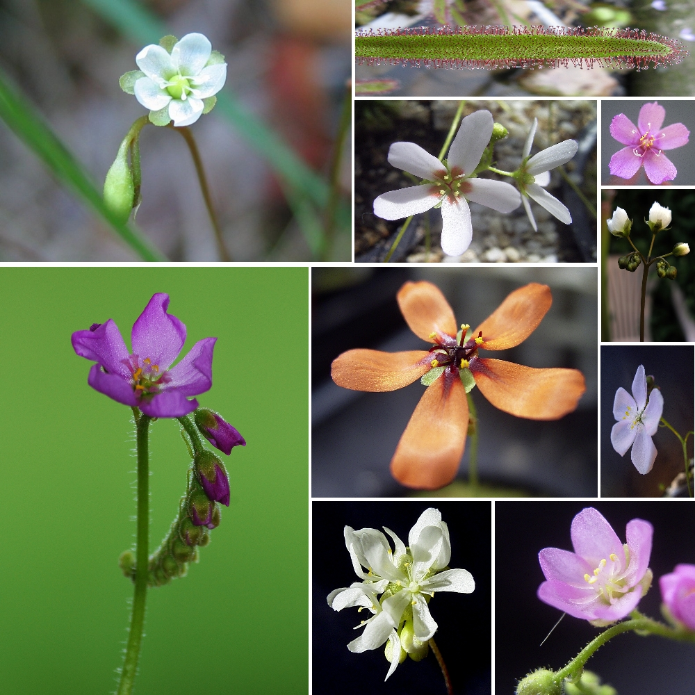 Fleurs de (de gauche à droite): Drosera rotundifolia Drosera Closterostigma Drosera Hartmeyerorum Drosera Binata Drosera Capensis Drosera Leucoblasta Drosera Macrantha Drosera Dichrosepala Drosera Madagascariensis (